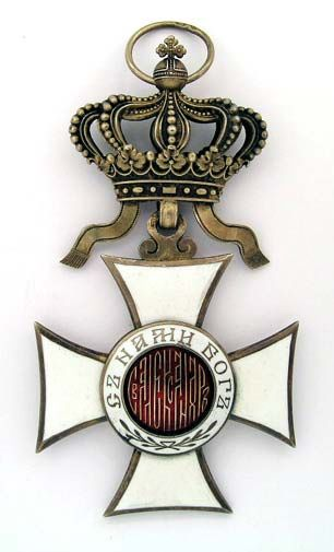 Орден Св. Александръ